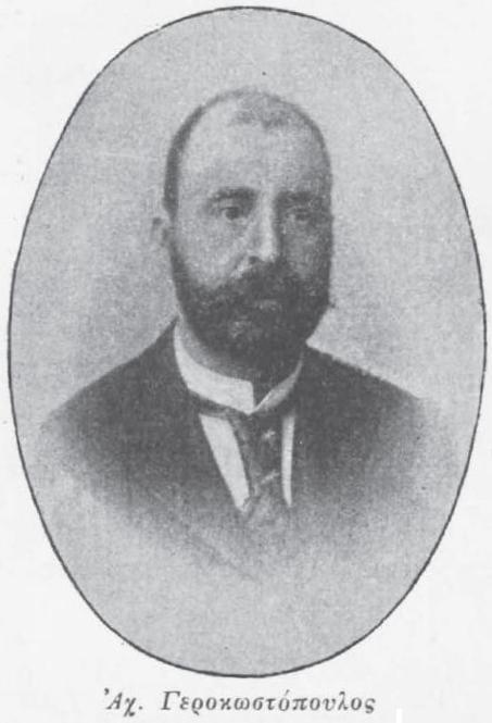 griechischer Regierungspolitiker, 1896